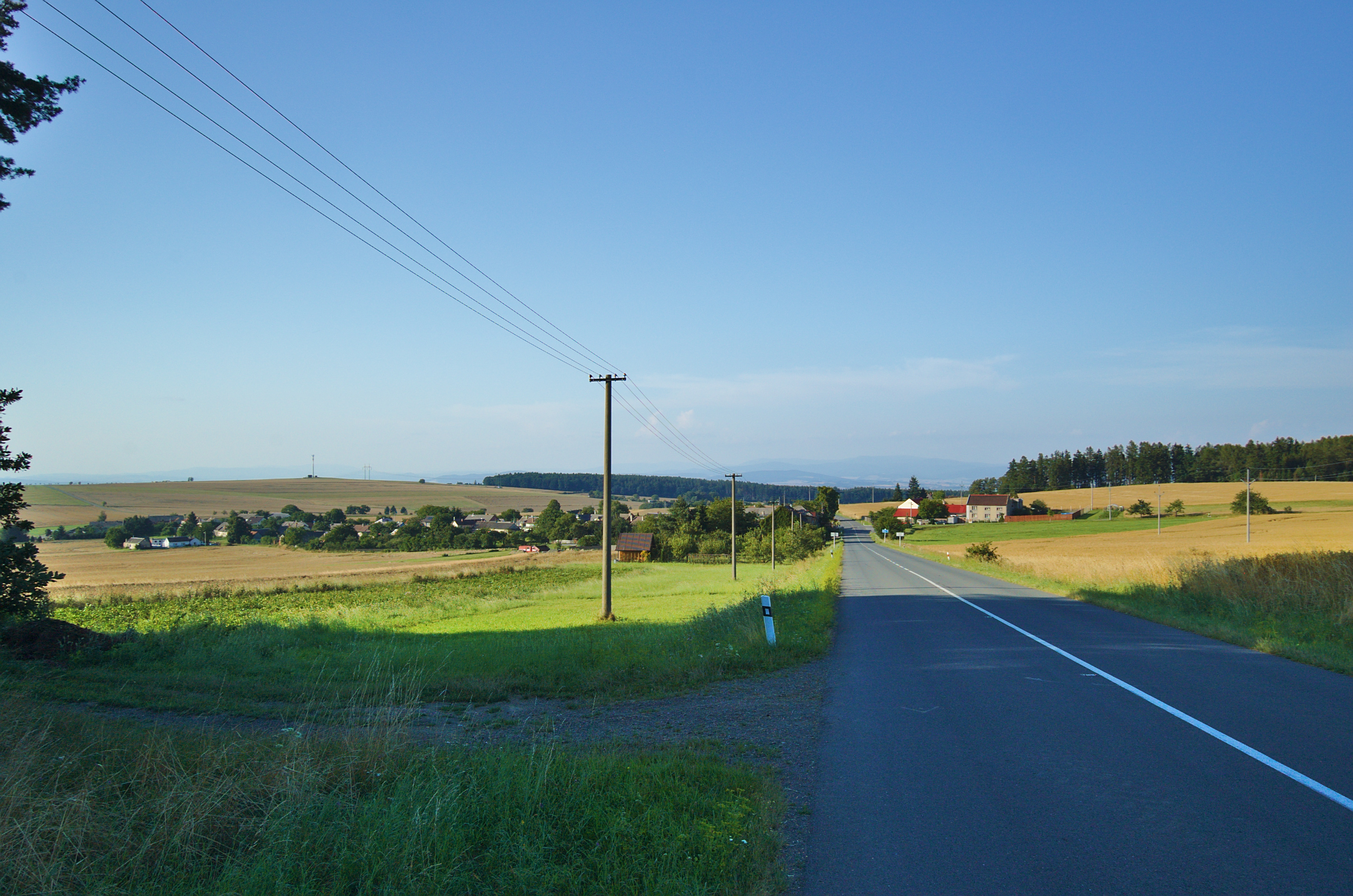 Pohled na obec od jihu z hlavní silnice, Ješov, Luká, okres Olomouc